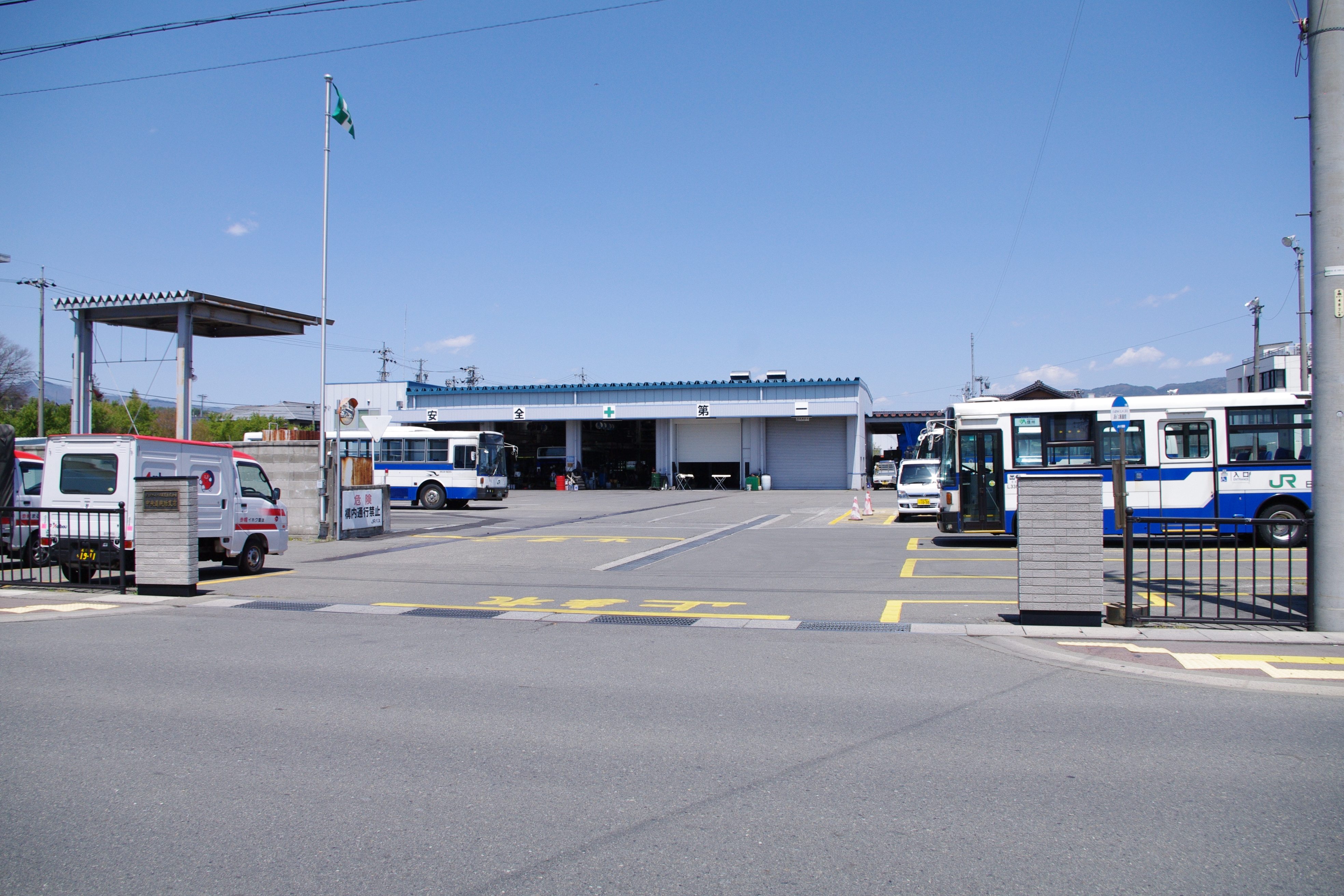 ジェイアールバス関東中央道支店